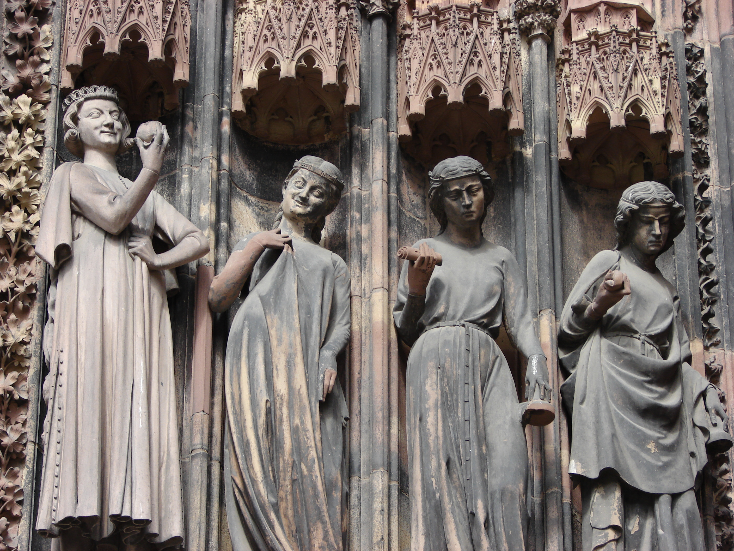 Le tentateur, sous la forme d'un beau jeune tente de séduire les vierges folles.